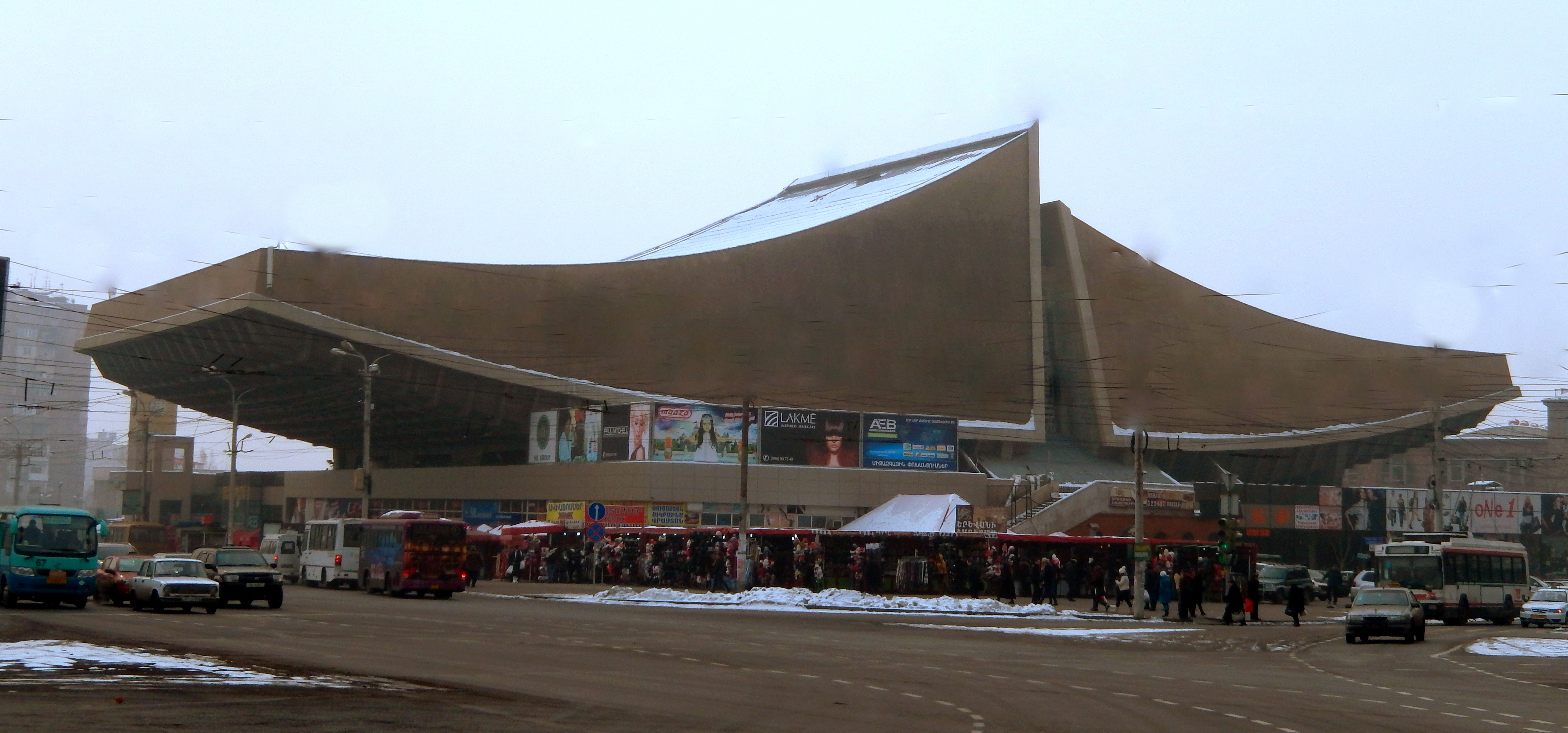 Հեղինակներ` Հրաչ Պողոսյանը, Արթուր Թարխանյանը, Սպարտակ Խաչիկյան